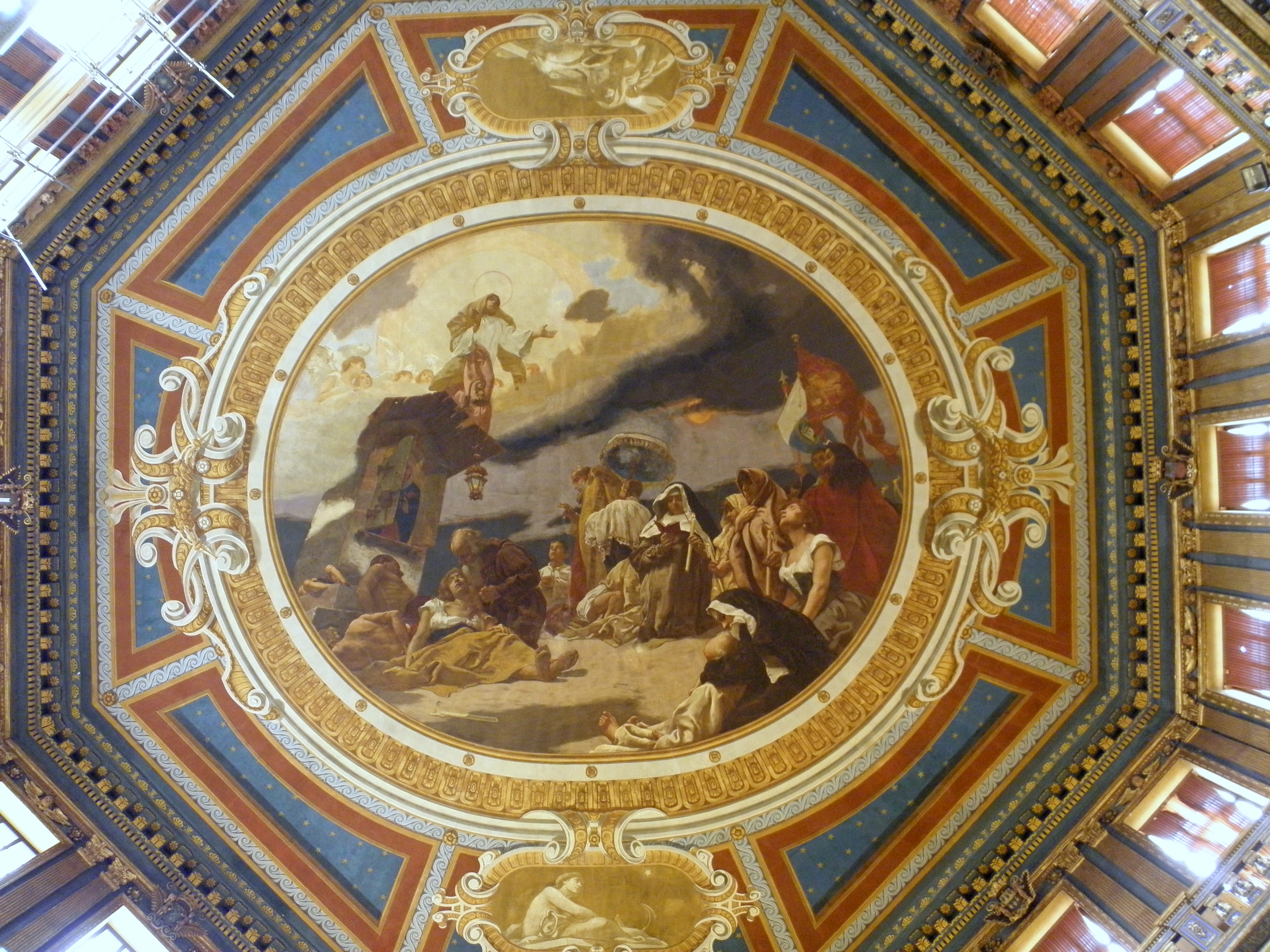 Rovigo, Chiesa della Beata Vergine del Soccorso detta "La Rotonda": interno, il soffitto affrescato da Vittorio Bressanin che riproduce un episodio della peste (1887).